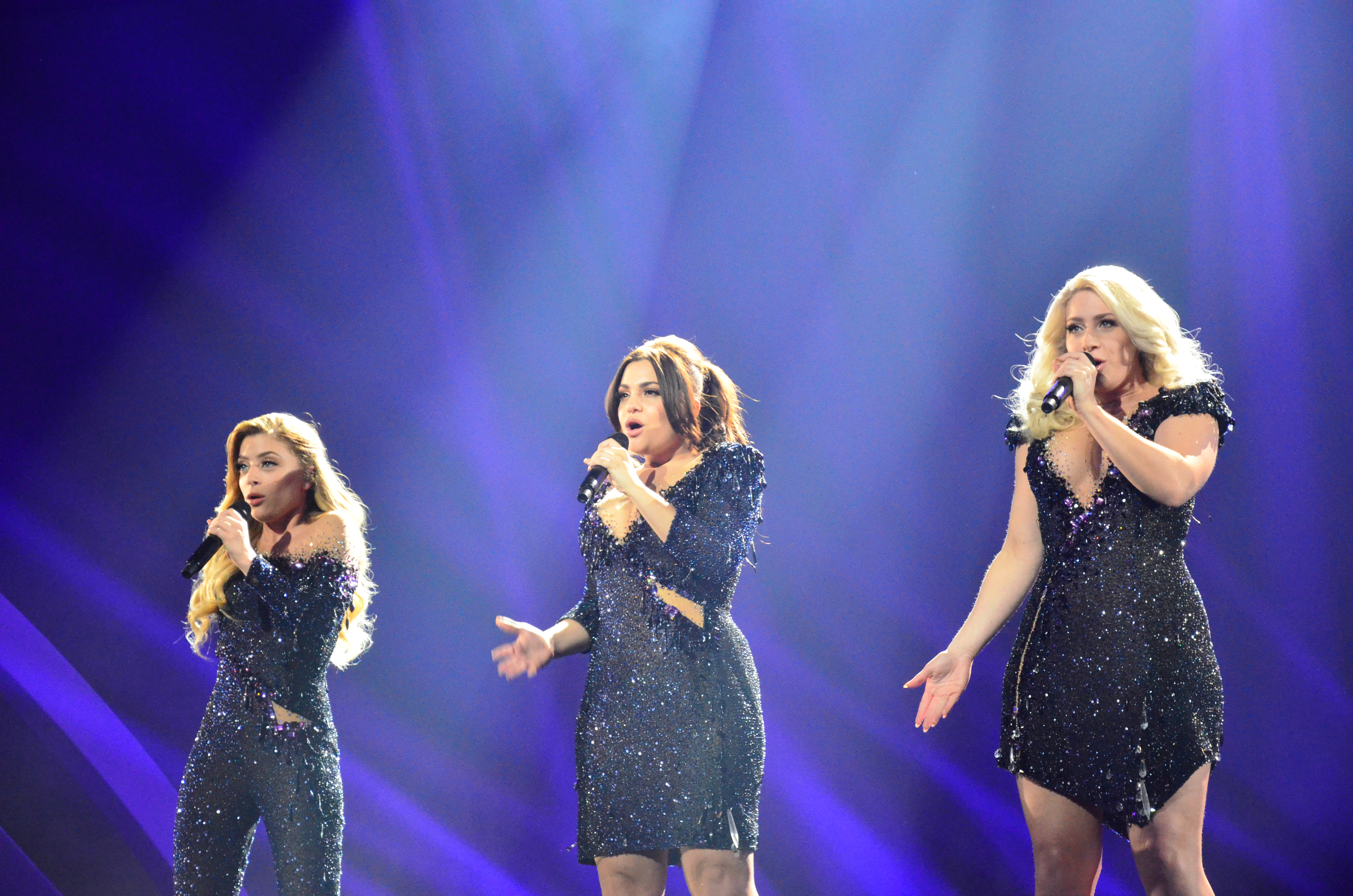 12 травня. Генеральна репетиція фіналу Євробачення 2017. OG3NE (The Netherlands).